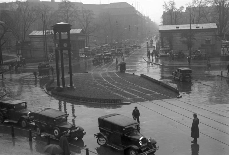 Der grosse Verkehrsstreik der Strassenbahn, Untergrundbahn und Autobusse in Berlin ! Blick auf den Potsdamer Platz am Tage des grossen Verkehrsstreiks.